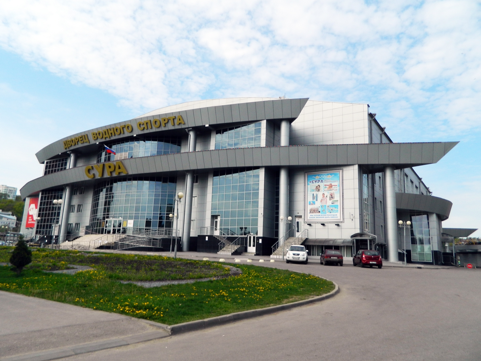 Дворец водного спорта "Сура" (г. Пенза).